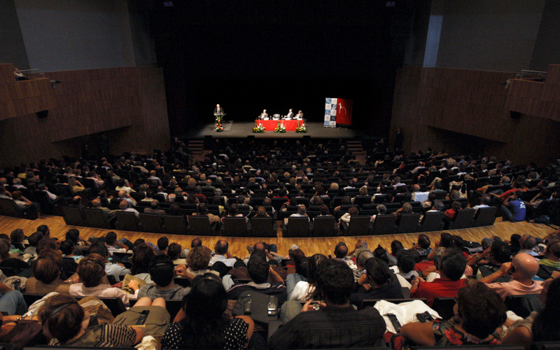 Auditorio de Huesca